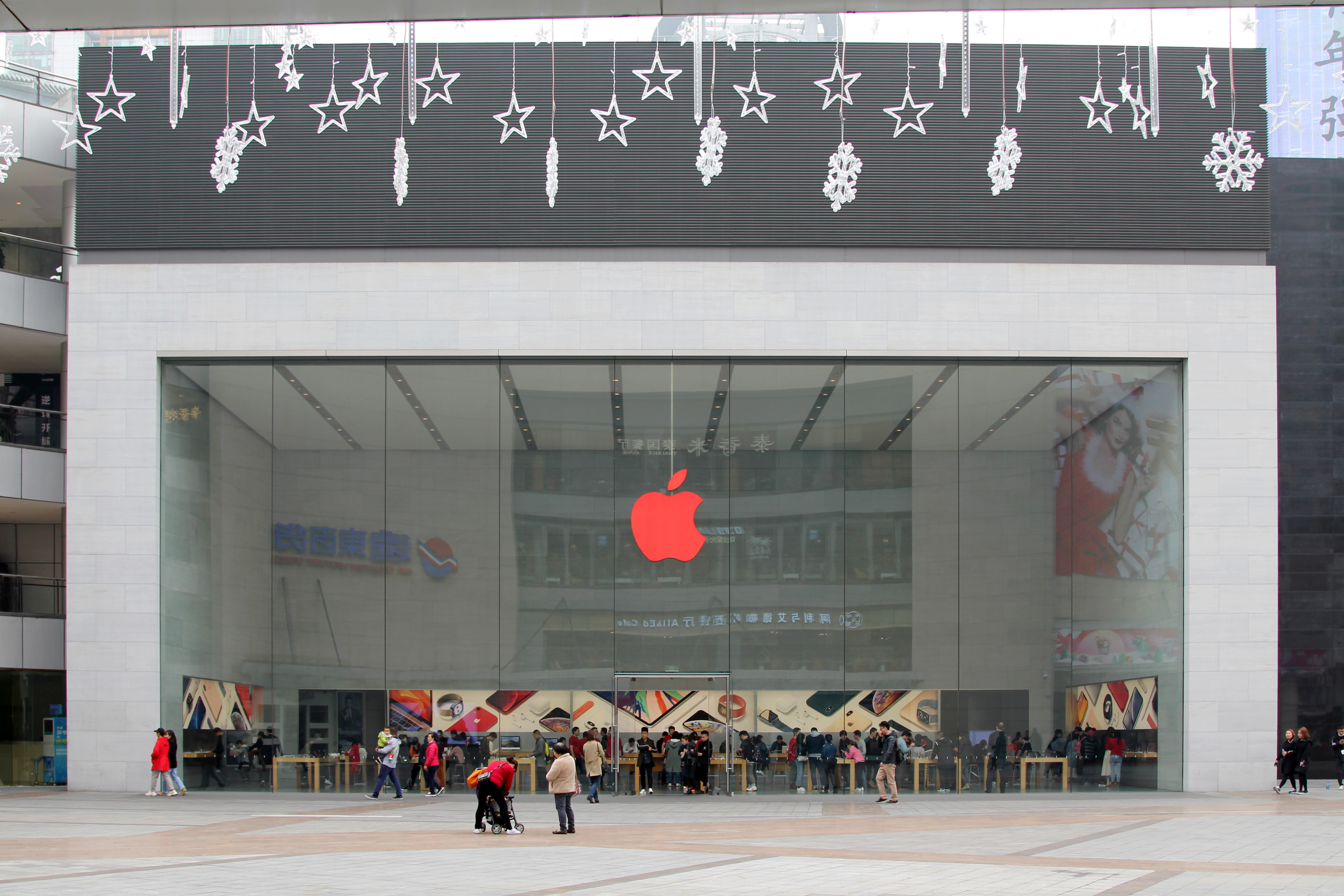 中文（中国大陆）: Apple 重庆北城天街 (PRODUCT)RED logo